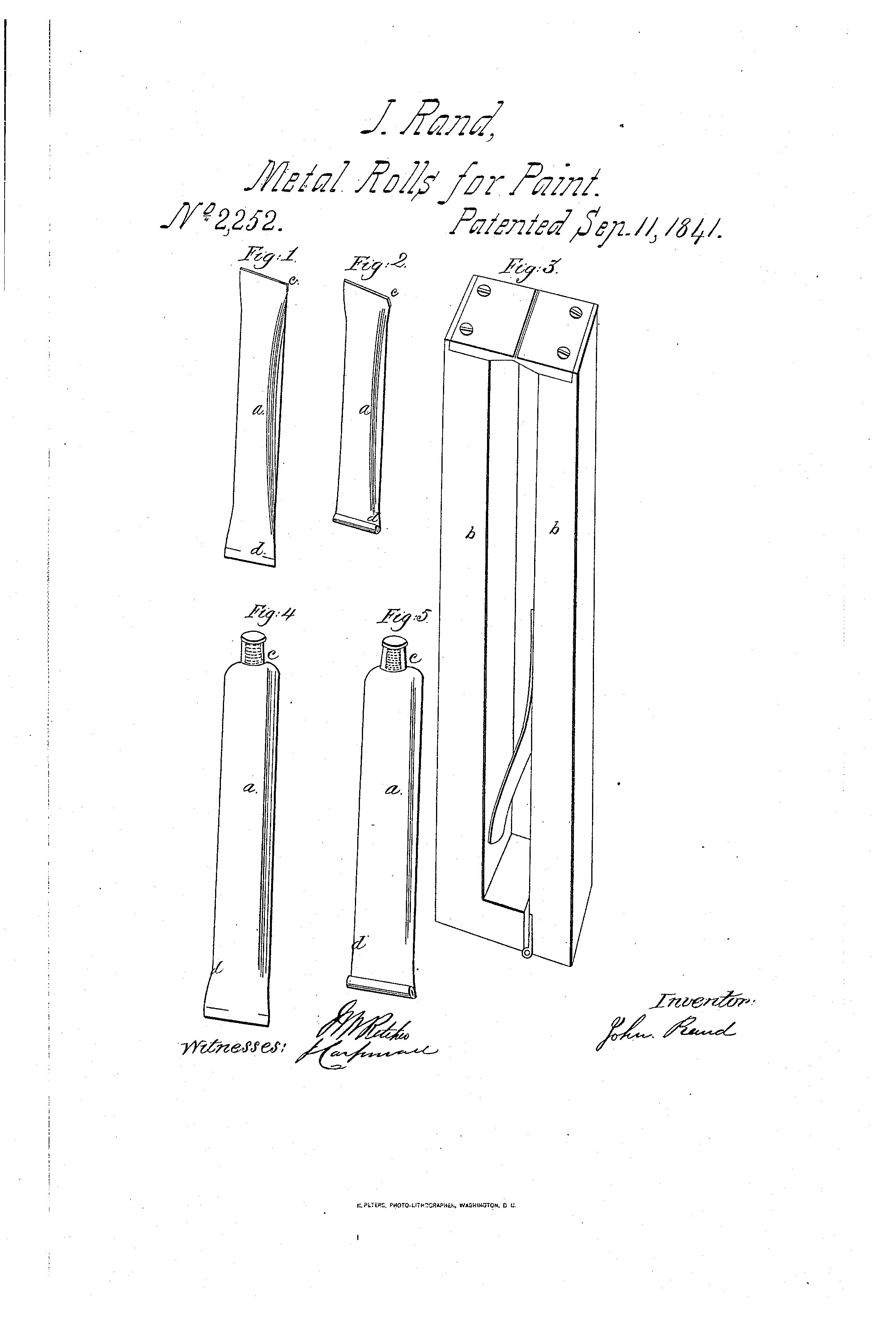 ככל הנראה השפופרת הראשונה, כפי ששימשה את הצייר ג'ון גופה רנד